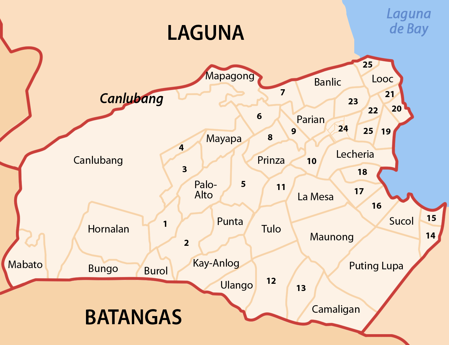 Barangay Map of Calamba City